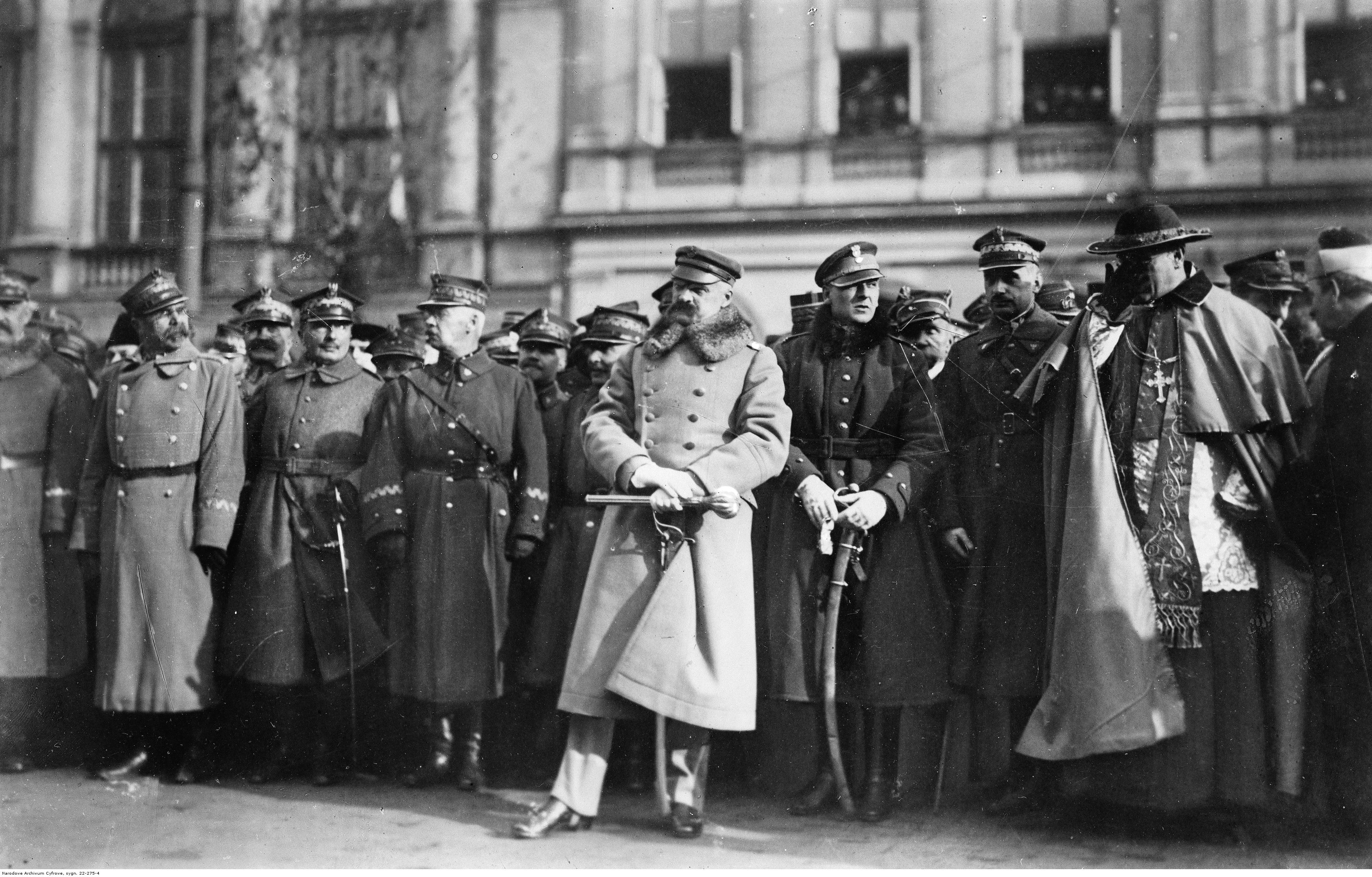 Marszałek Józef Piłsudski na placu Zamkowym, po wręczeniu mu buławy marszałkowskiej. Widoczni m.in.: ppłk Bolesław Wieniawa-Długoszowski (1. na prawo od marszałka), generał Kazimierz Sosnkowski (na prawo od ppłk. Wieniawy-Długoszowskiego), biskup polowy Wojska Polskiego Stanisław Gall (na prawo od gen. Sosnkowskiego).